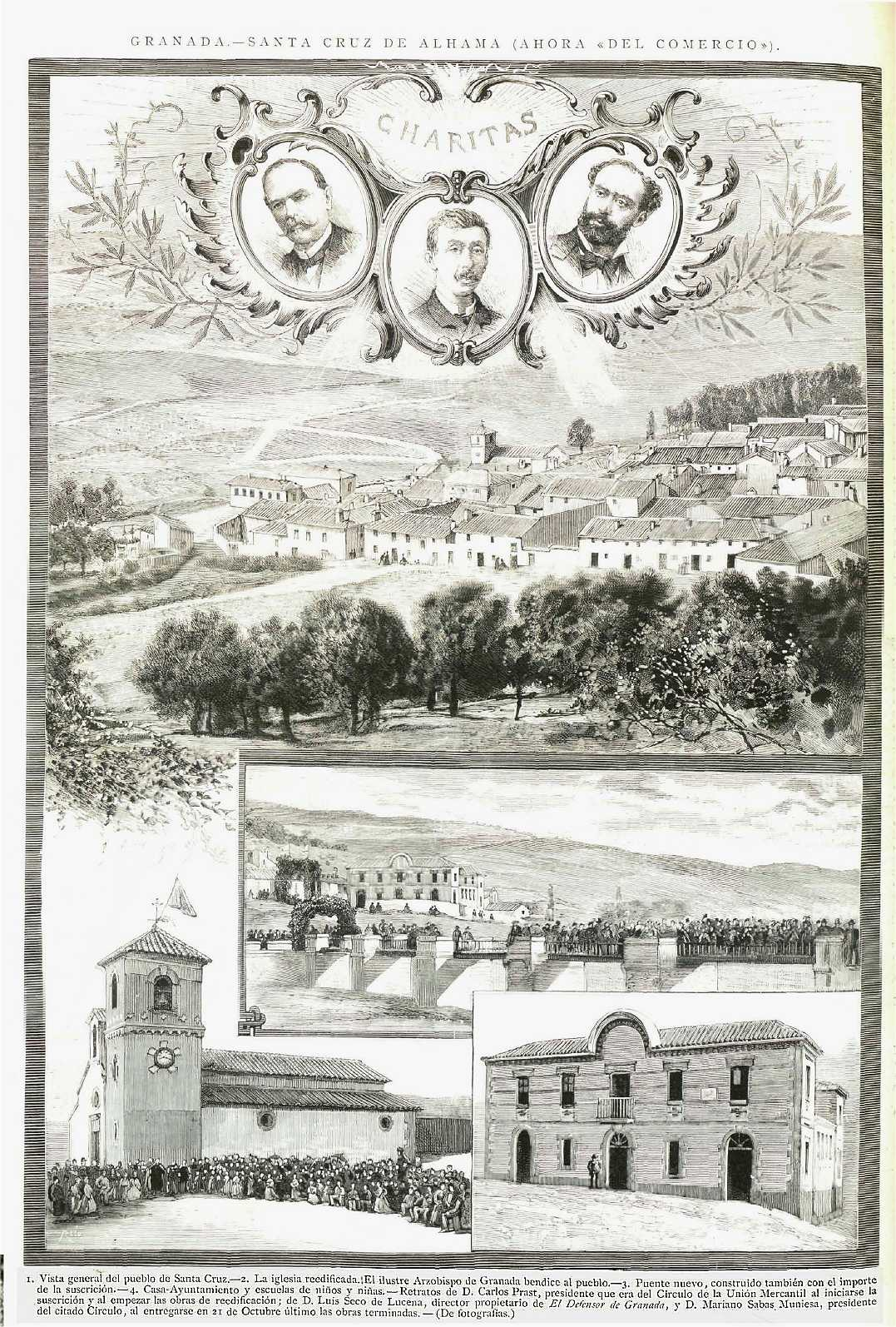 Santa Cruz del Comercio - ricostruita dopo il terremoto di Granada del 1884 con i fondi raccolti dal Circolo della Unione Mercantile di Madrid - gli effigiati sono da sinistra: Carlos Prast, Luis Seco de Lucena Escalada e Mariano Sabas Muniesa.